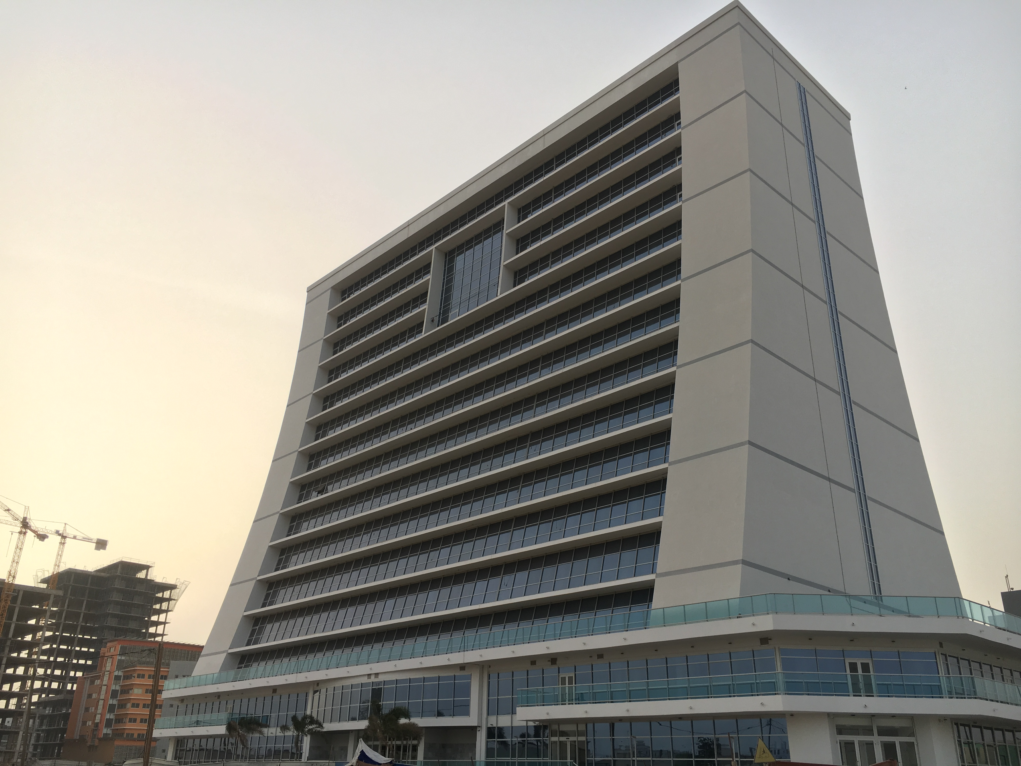 هذه صورة من برج سنيم في مدينة نواكشوط